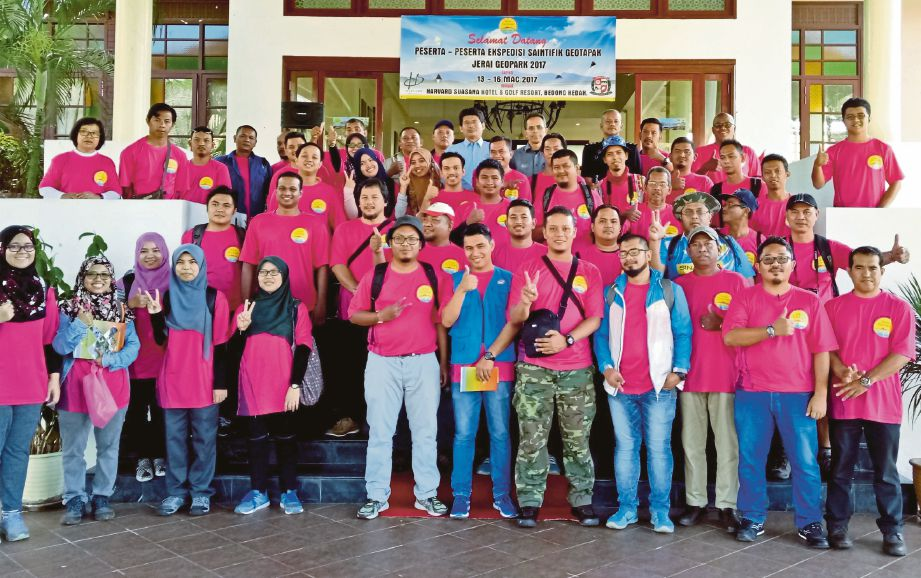 Ekspedisi Saintifik Geotapak Jerai Geopark 2017